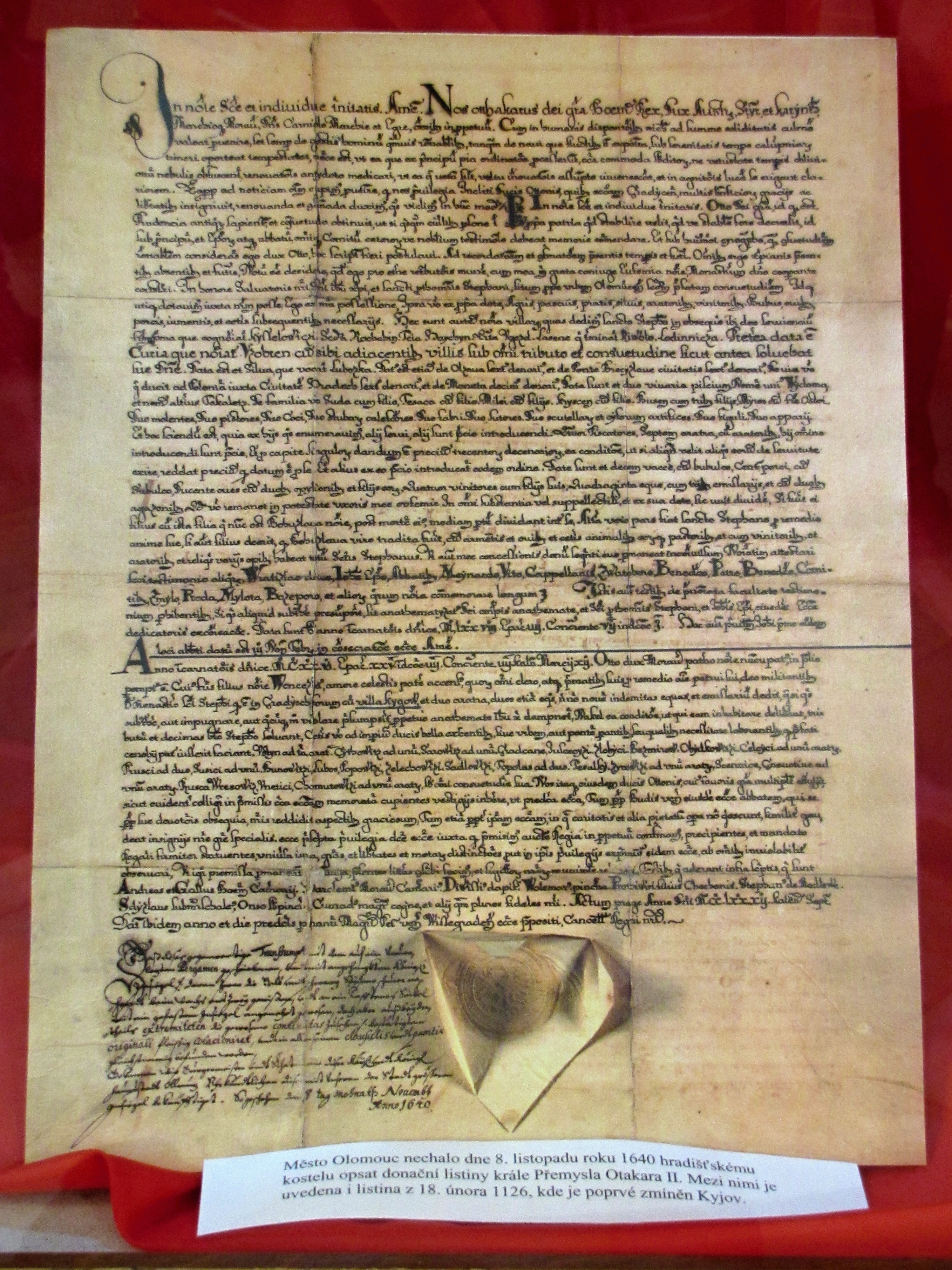 Faksimile opisu listiny z roku 1126, která je první písemnou zmínkou o městě Kyjov. Opis byl pořízen 8. listopadu 1640. V textu je psáno: "Léta od vtělení Božího 1126 dne 18. února Oto II., kníže moravský, nazvaný tak po otci, zahynul v bitvě. Jeho bratra syn jménem Václav, zanícený láskou k nebeské vlasti, se vším kněžstvem a pány svými dal ke spáse duše svého strýce mnichům v klášteře svátého Štěpána v Hradišti v božích službách bojujícím trh se vsí Kyjovem a dvě popluží, dva koně, devět klisen a hřebce. Kdo by se odvážil toto darování odciziti nebo jakýmkoli způsobem porušiti, budiž stižen věčnou kletbou Ježíše Krista."